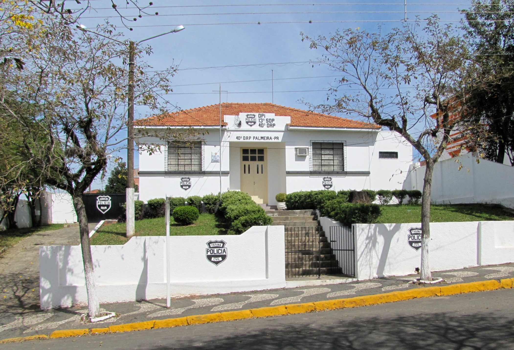 Delegacia da cidade de Palmeira. Inaugurada pelo Secretário de Segurança, Pedro Scherer Sobrinho, em 04 de junho de 1950, no governo de Moysés Lupion.